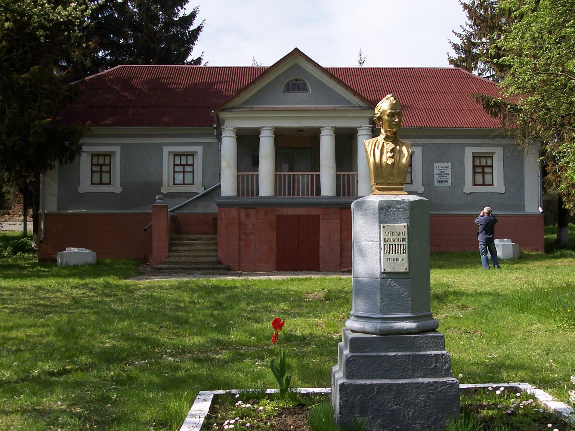 Suvorov's Museum, Timanivka, Vinnitska obl, pict 01 Музей Суворова, с. Тимановка,Тульчинский р-н, Винницкая обл. фото 01 Музей Суворова, с. Тиманівка, Тульчинський р-н, Вінницька обл. фото 01